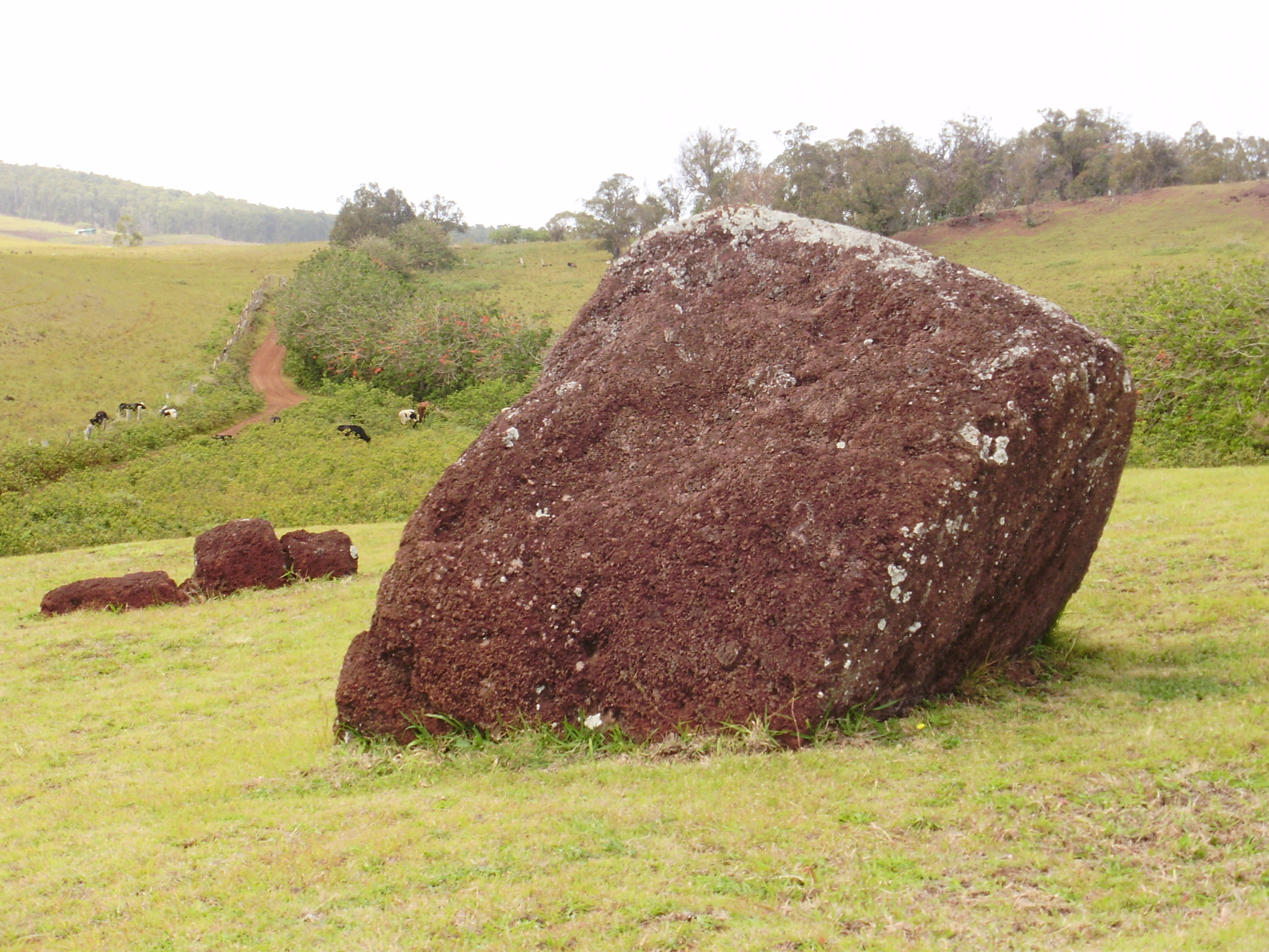 Pukao (moño de moái) en Puna Pau, en Isla de Pascua, Chile.